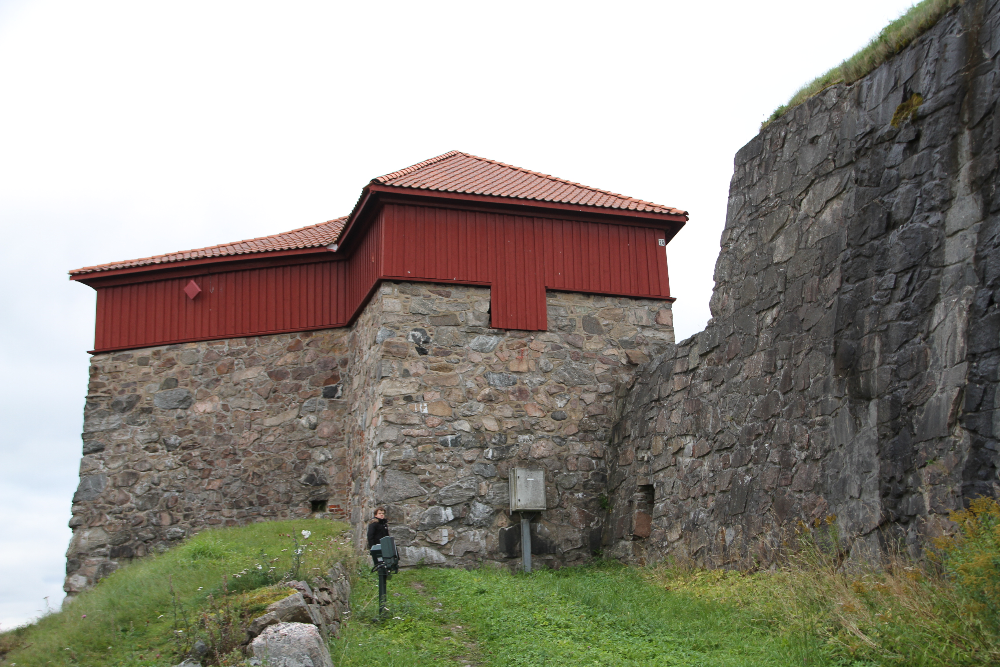 Fredriksten fortress, 18th century, in the city of Halden (Østfold), southeastern Norway.